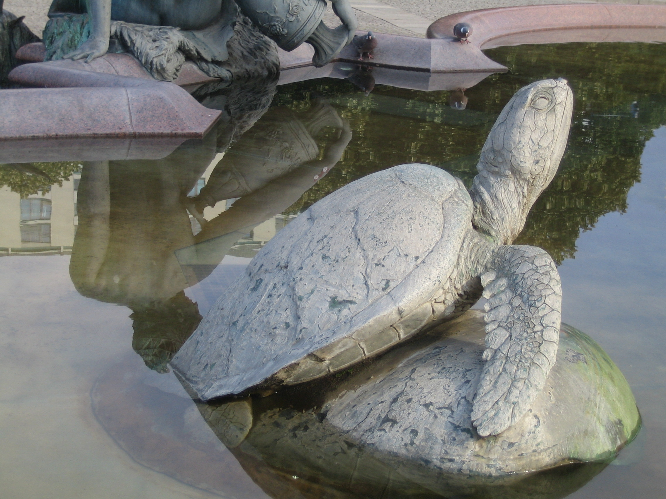 Berlin, Neptunbrunnen (Neptunes fountain), detail.